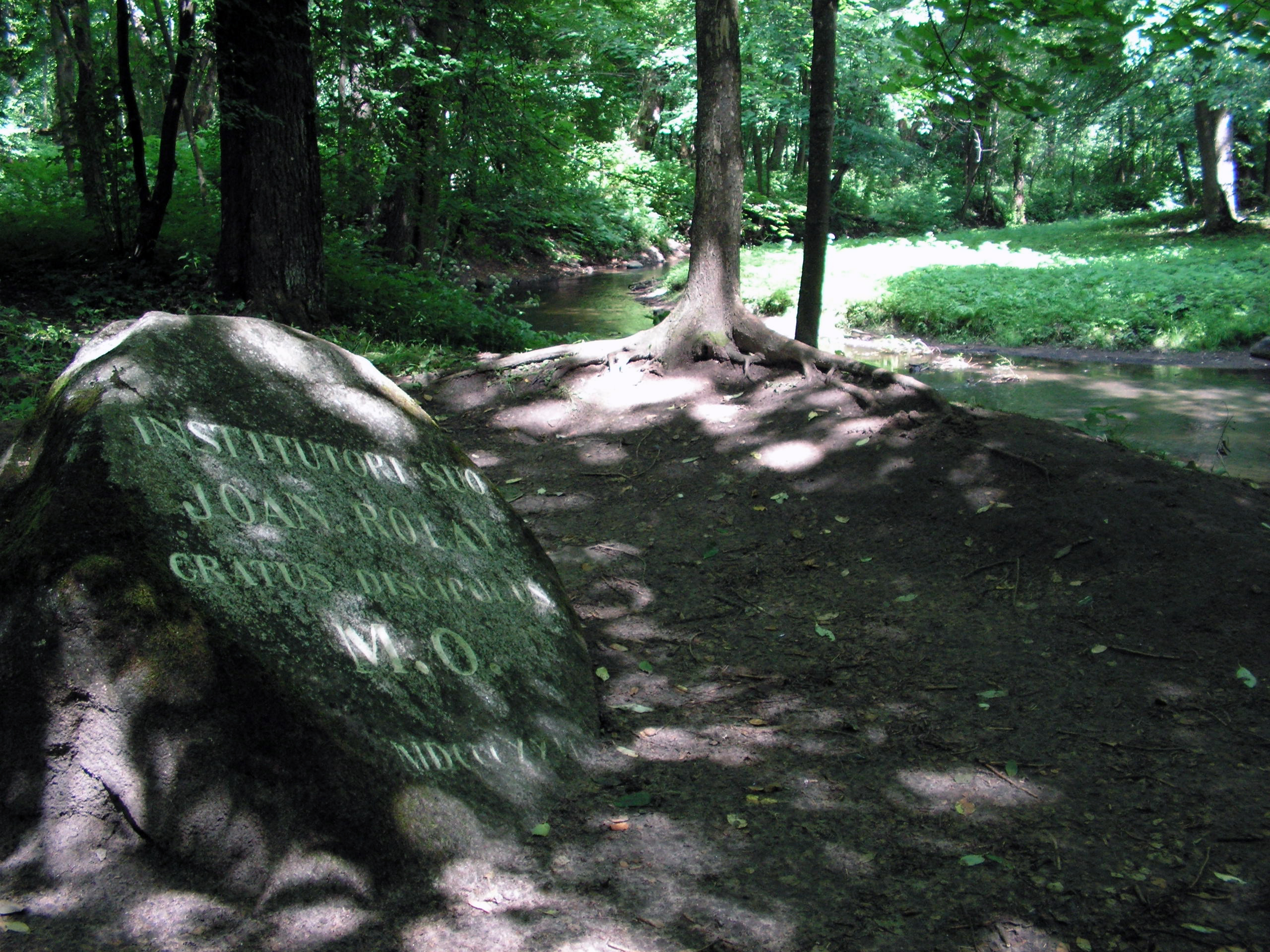 Беларуская (тарашкевіца): Камень з надпісам па-лацінску ад удзячнага вучня арганізатару нечага гэтага, наколькі я пераклаў. Сядзіба Міхала Клеафаса Агінскага ў Залесьсі (Смаргонскі раён)